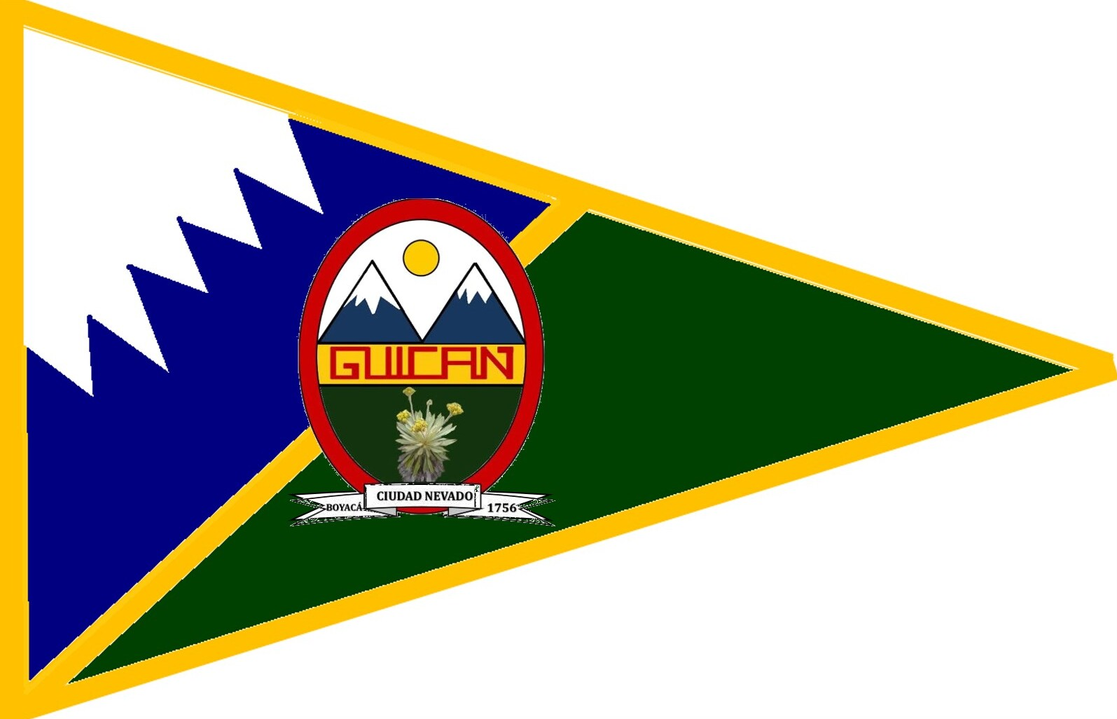 Bandera del municipio de Güicán de la Sierra